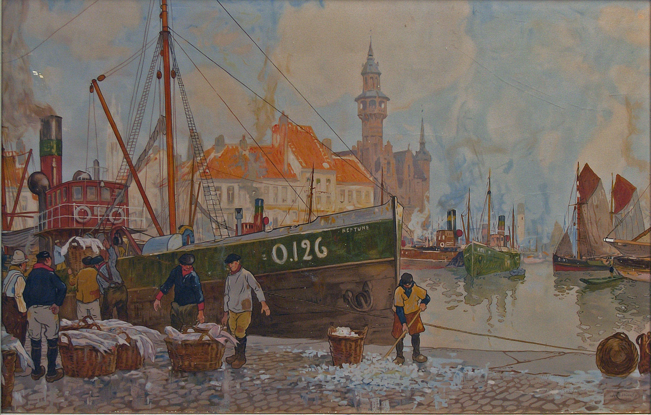 "Vissershaven, Oostende", Chromolitho; getekend door Henri Cassiers (1858-1944); academie van Brussel en Antwerpen